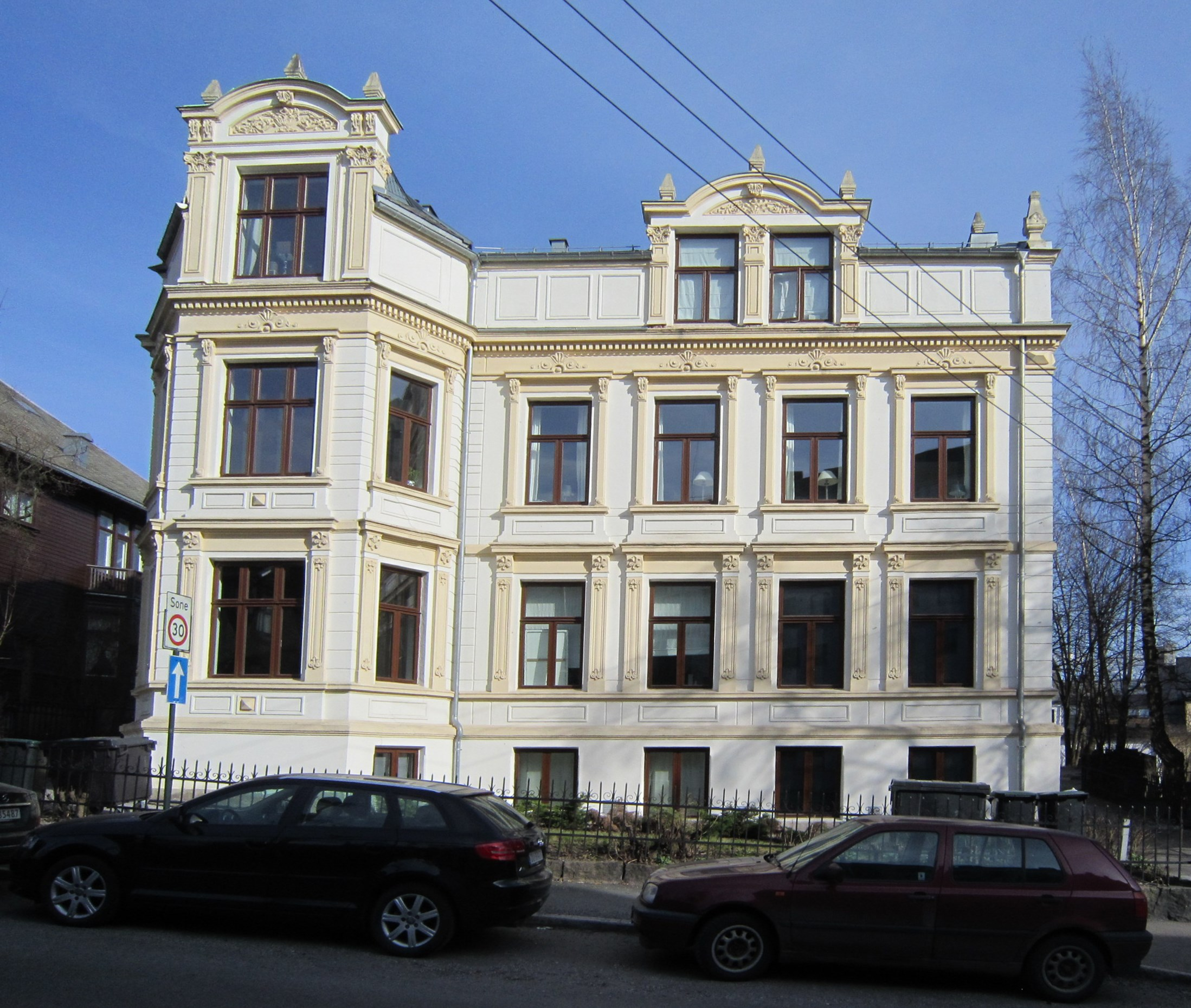 Kruses gate 3 på Frogner i Oslo